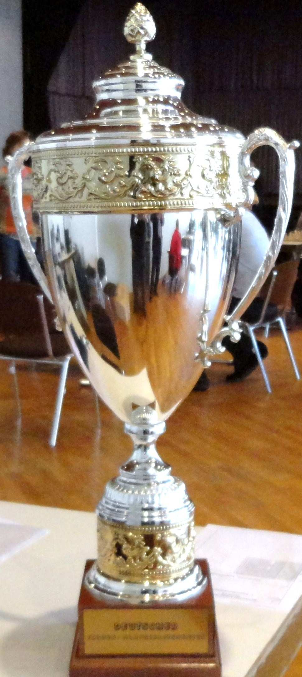 Pokal der Deutschen Frauen-Schachbundesliga, Finalrunden der Schachbundesliga der Frauen, Saison 2011/12 in Gladenbach.